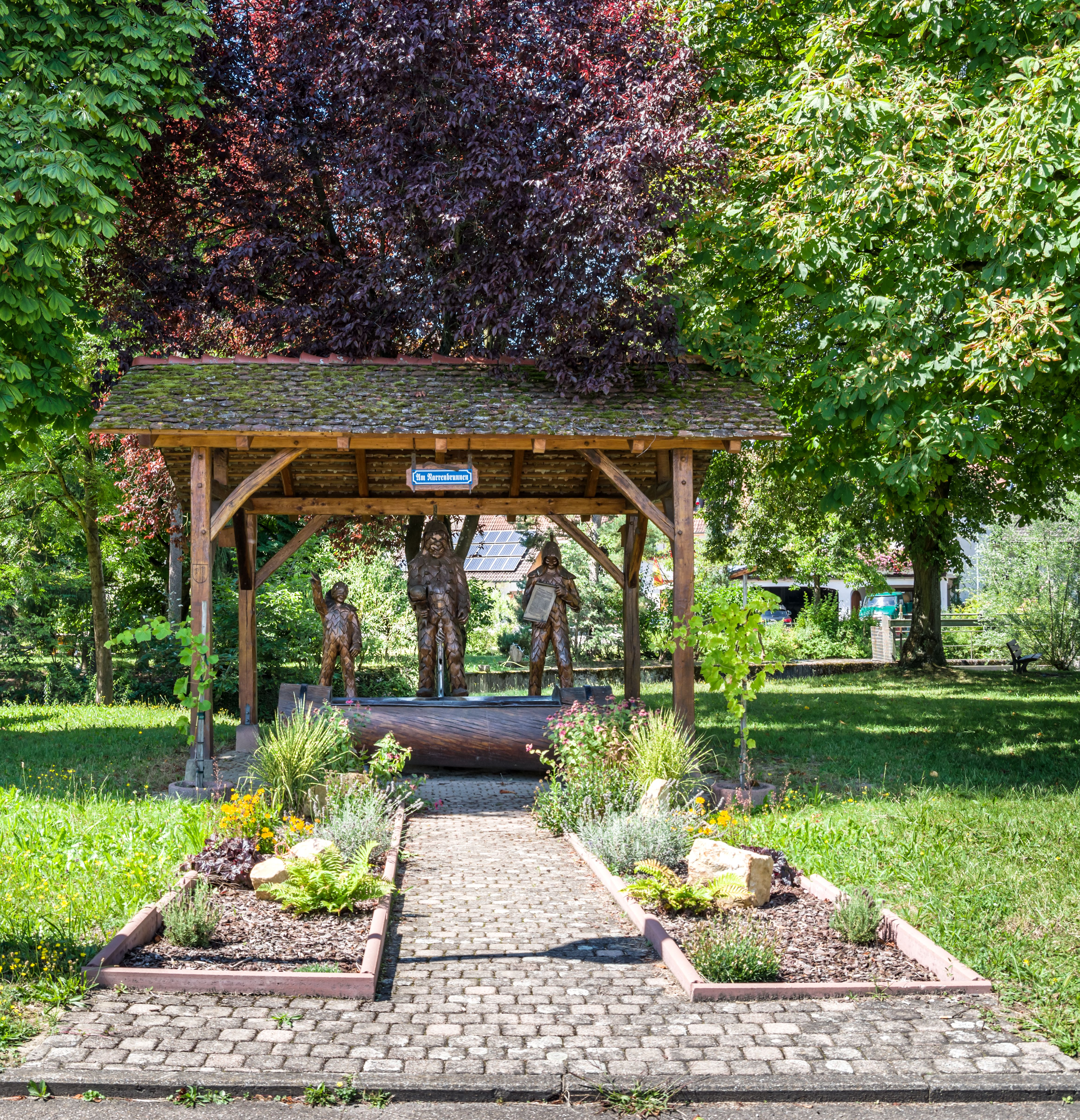 Bilder aus Gottenheim Der Narrenbrunnen